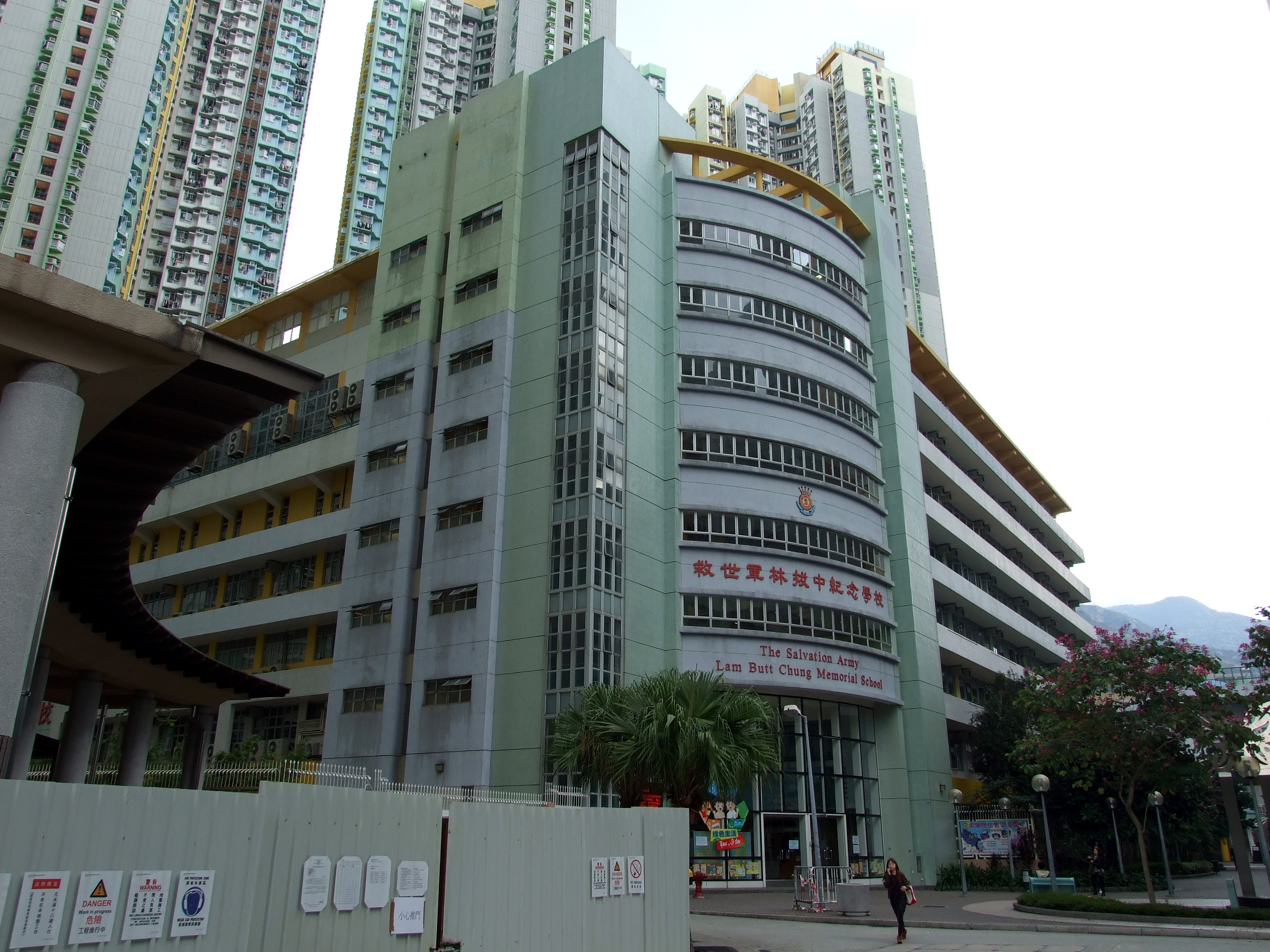 中文（香港）: 救世軍林拔中紀念學校